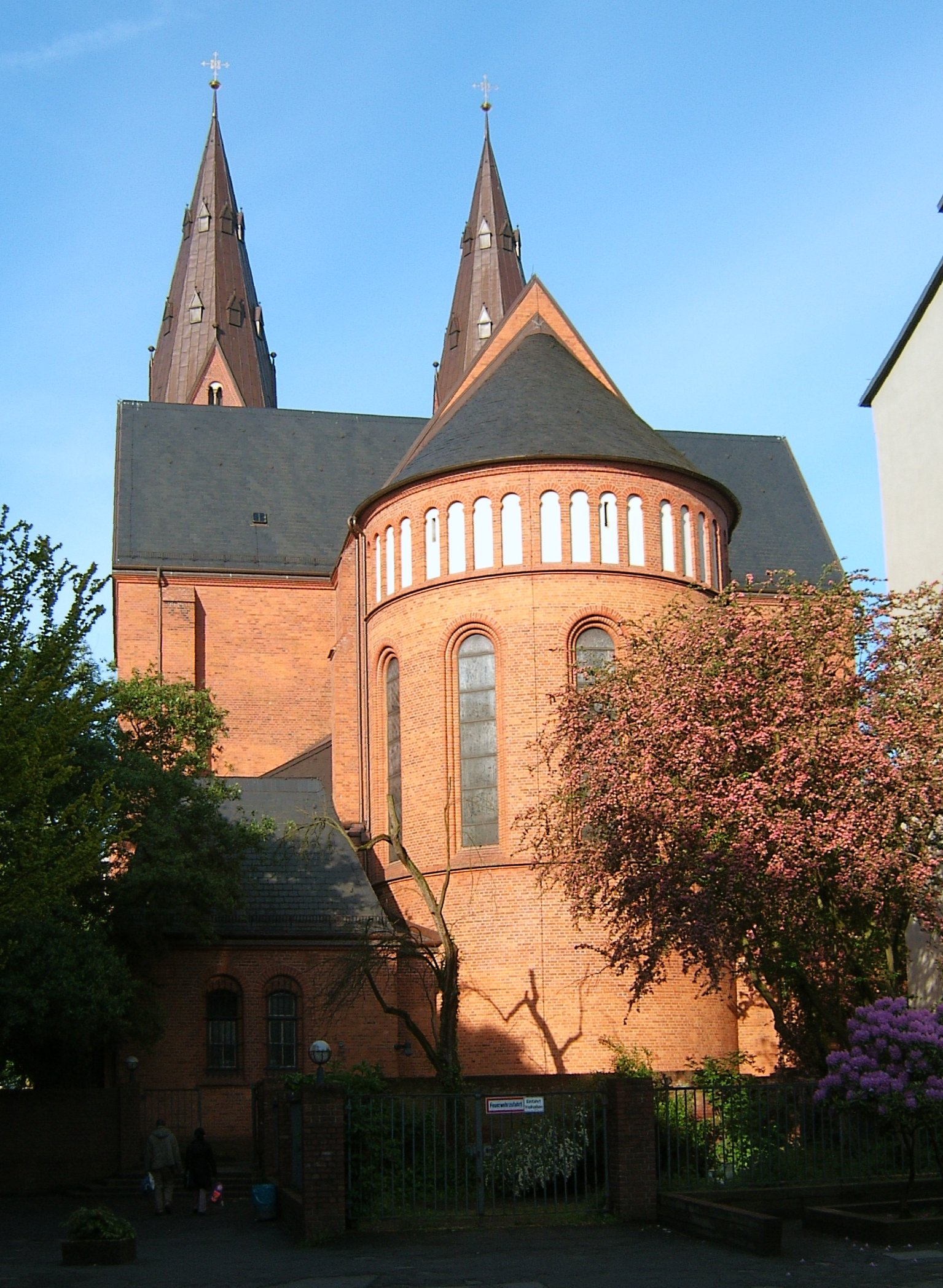 Die heutige Domkirche St. Marien in der Danziger Straße in St. Georg wurde von 1890 bis 1893 nach Plänen von Arnold Güldenpfennig im romanischen Stil erbaut. Sie war damals das erste nach der Reformation als römisch-katholische Kirche neu erbaute Gotteshaus in Hamburg.